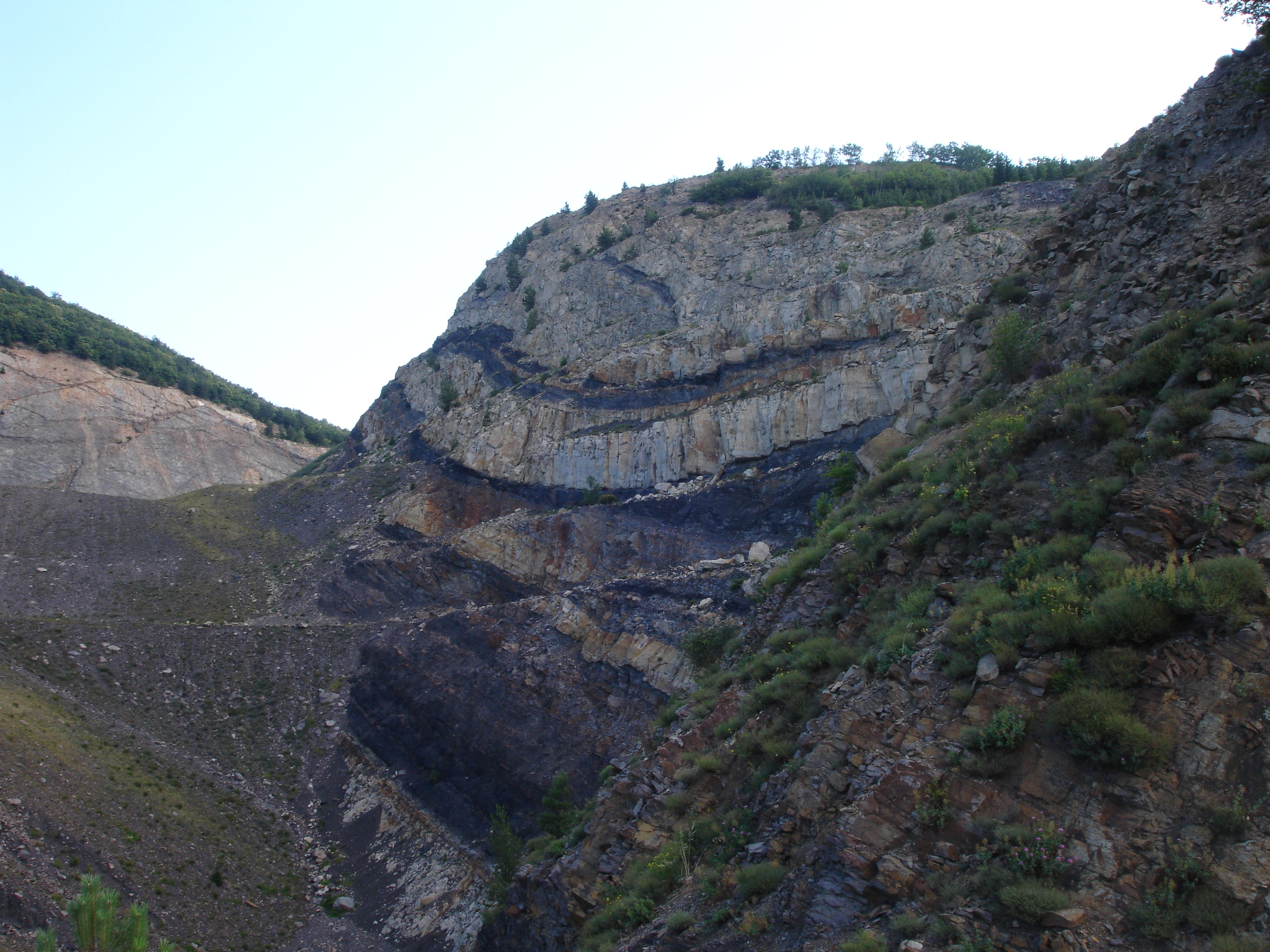 France - Hérault (34) - Carrière de Charbon de Graissessac